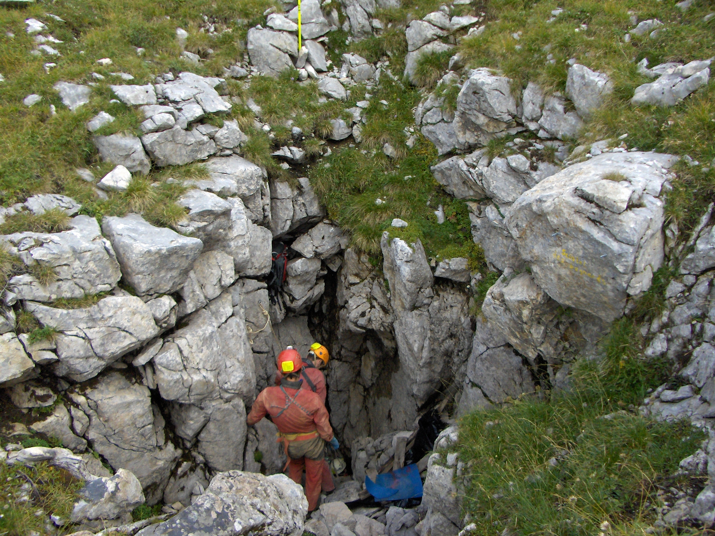 Ce gouffre situé à proximité du scialet du Pré de l'Achard exploré jusqu'à -258 m n'est pas relié au réseau du Clot d'Aspres.